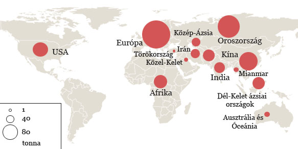 Heroin fogyasztás a világon